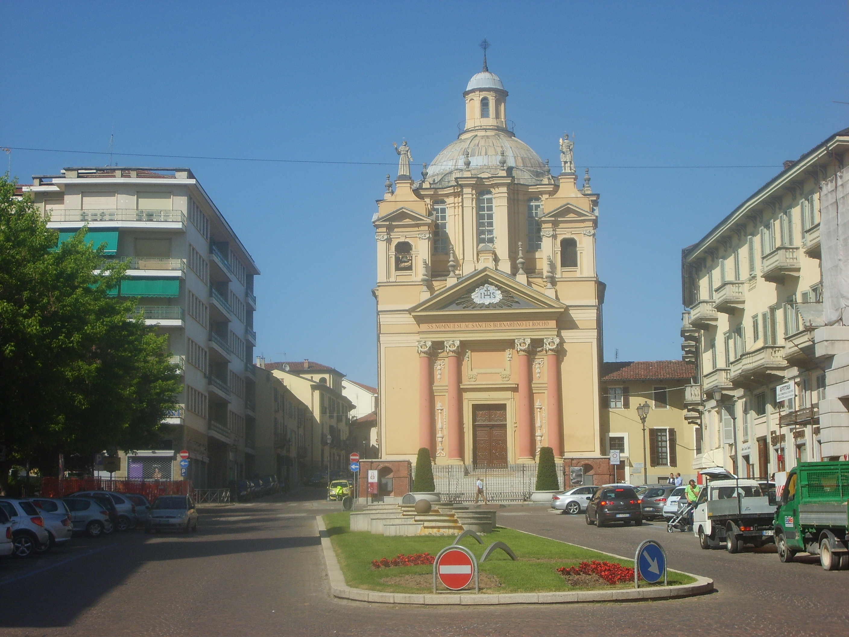 facciata della chiesa dei santi Bernardino e Rocco di Chieri